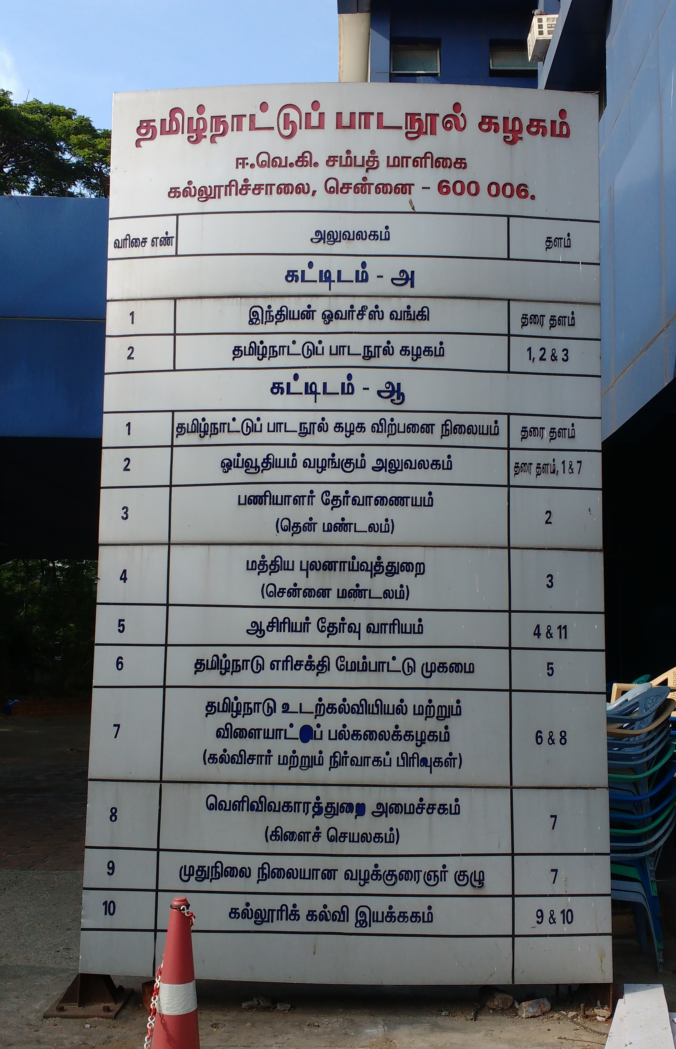 ஈவிகே சம்பத் மாளிகையில் உள்ள அரசு அலுவலக தகவல் பலகை